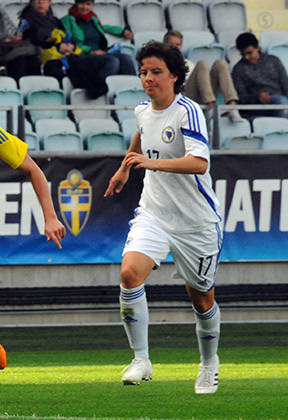 Olivia Schough (22) vs Milena Nikolić (5) and Amela Kršo (17)